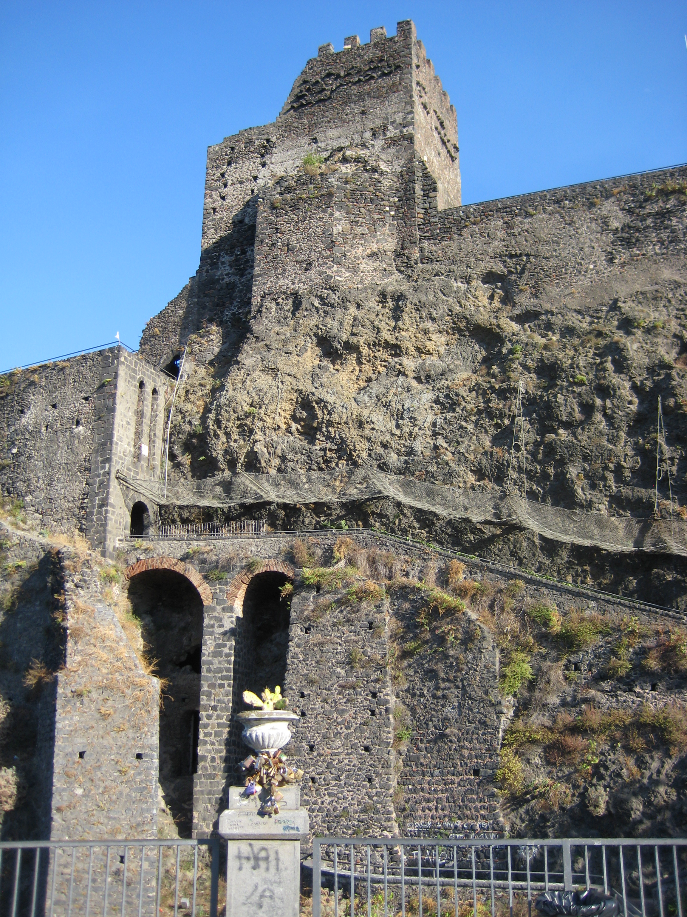 Comune di Acicastello Provincia di Catania Castello Normanno (SEC. XI)